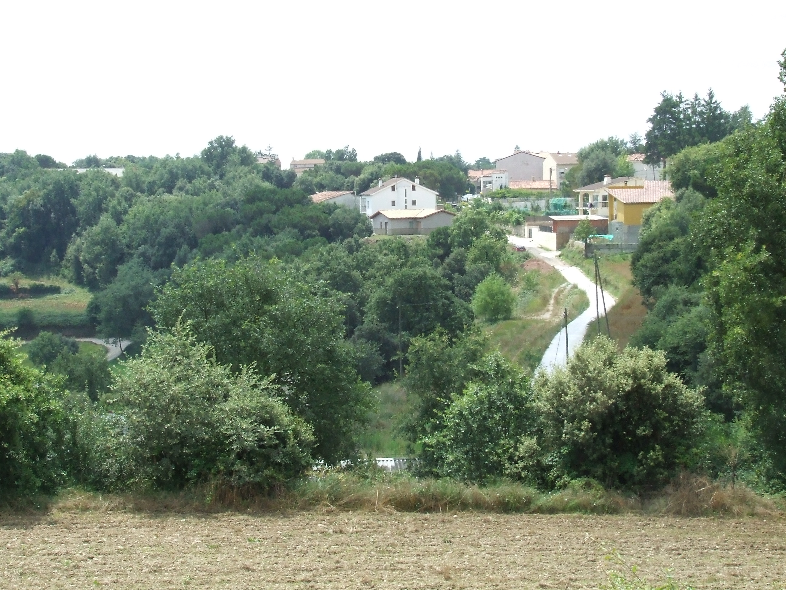 El Torrent de l'Embosta (Castellcir, Moianès)